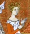 Blanche d'Artois